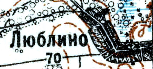 Топографическая карта Ленинградской области, квадрат VIc-28 (Луга), деревня Люблино